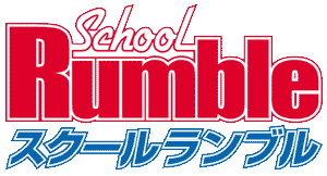 Logo des Anime School Rumble